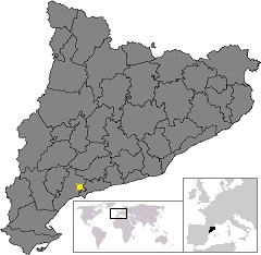 Localització de Reus. Location of Reus in Catalonia.